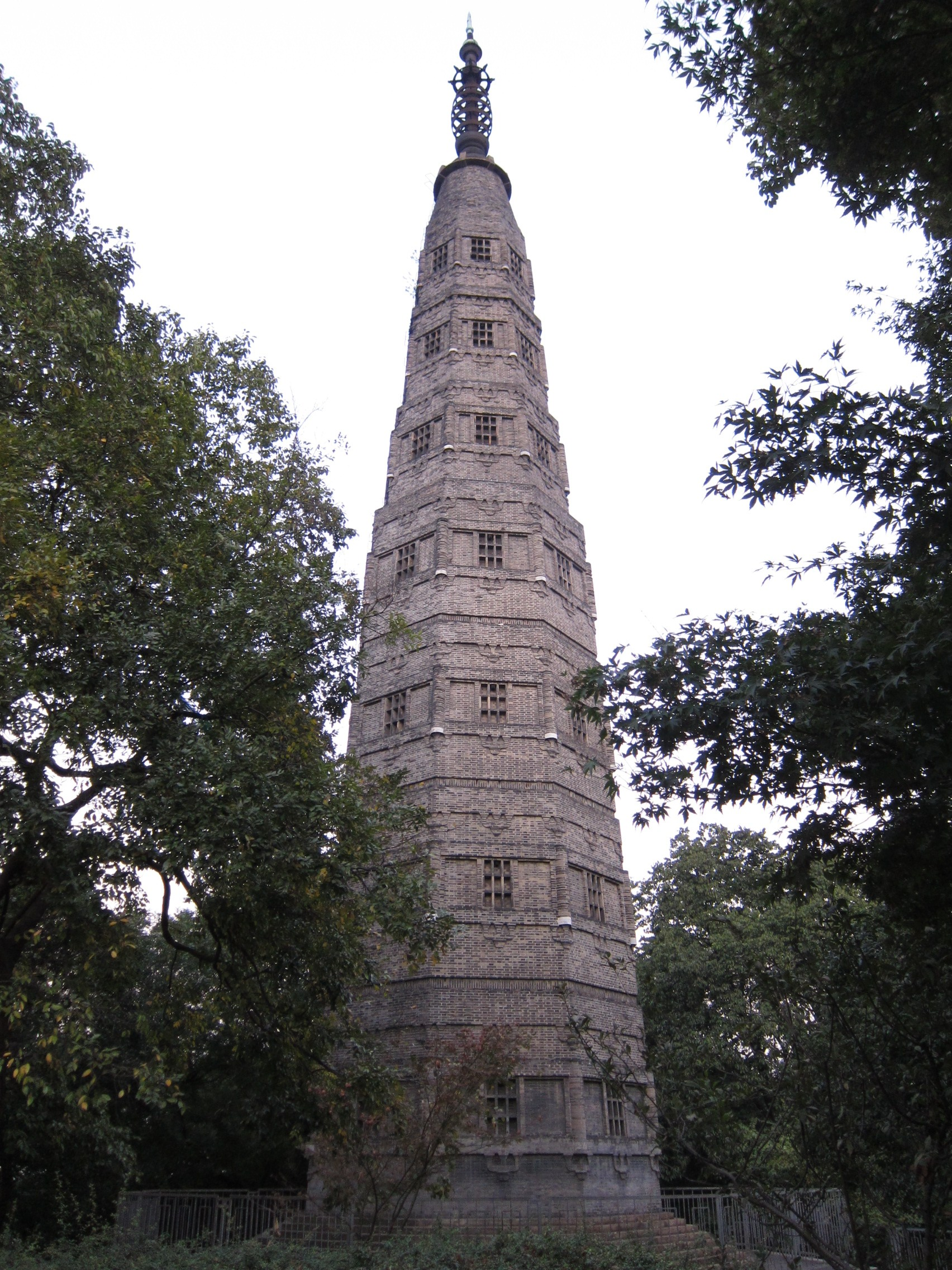 保俶塔，始建於宋初，元、明時期多次被毀，民國十三年（1924年）按照明末樣式重建。